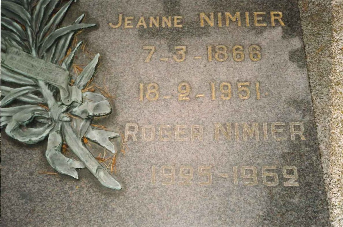 tombe de Roger Nimier au cimetière de Saint-Brieuc